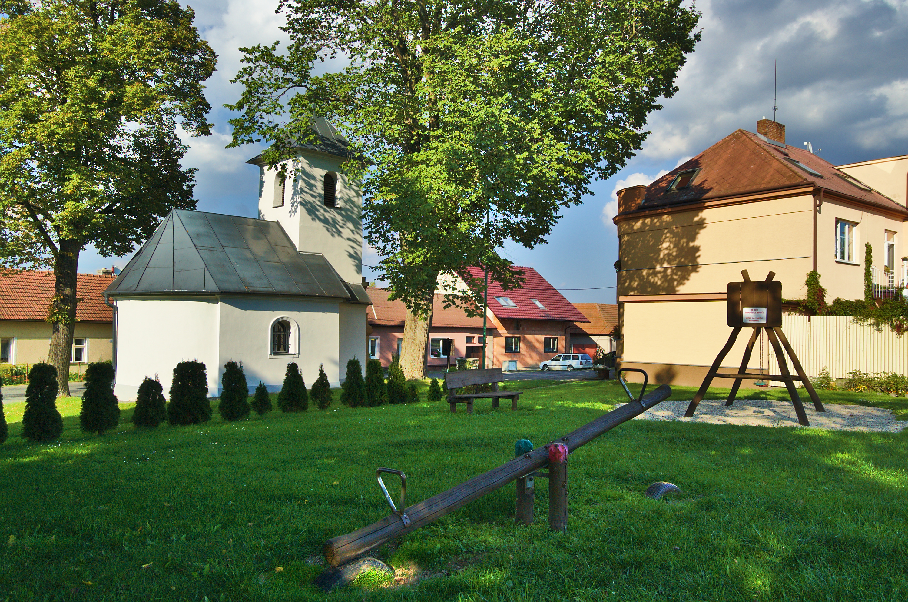 Kaple svaté Anny, Suchdol, okres Prostějov